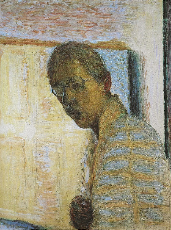 Pierre Bonnard. Autoportrait de l'artiste par lui-même, 1930. Crayon et gouache sur papier. 65 x 50 cm. Bridgeman Art Library.